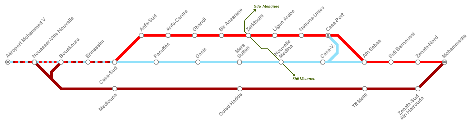 Plan du réseau global de RER casablancais (horizon 2030 selon le PDU/SDAU)